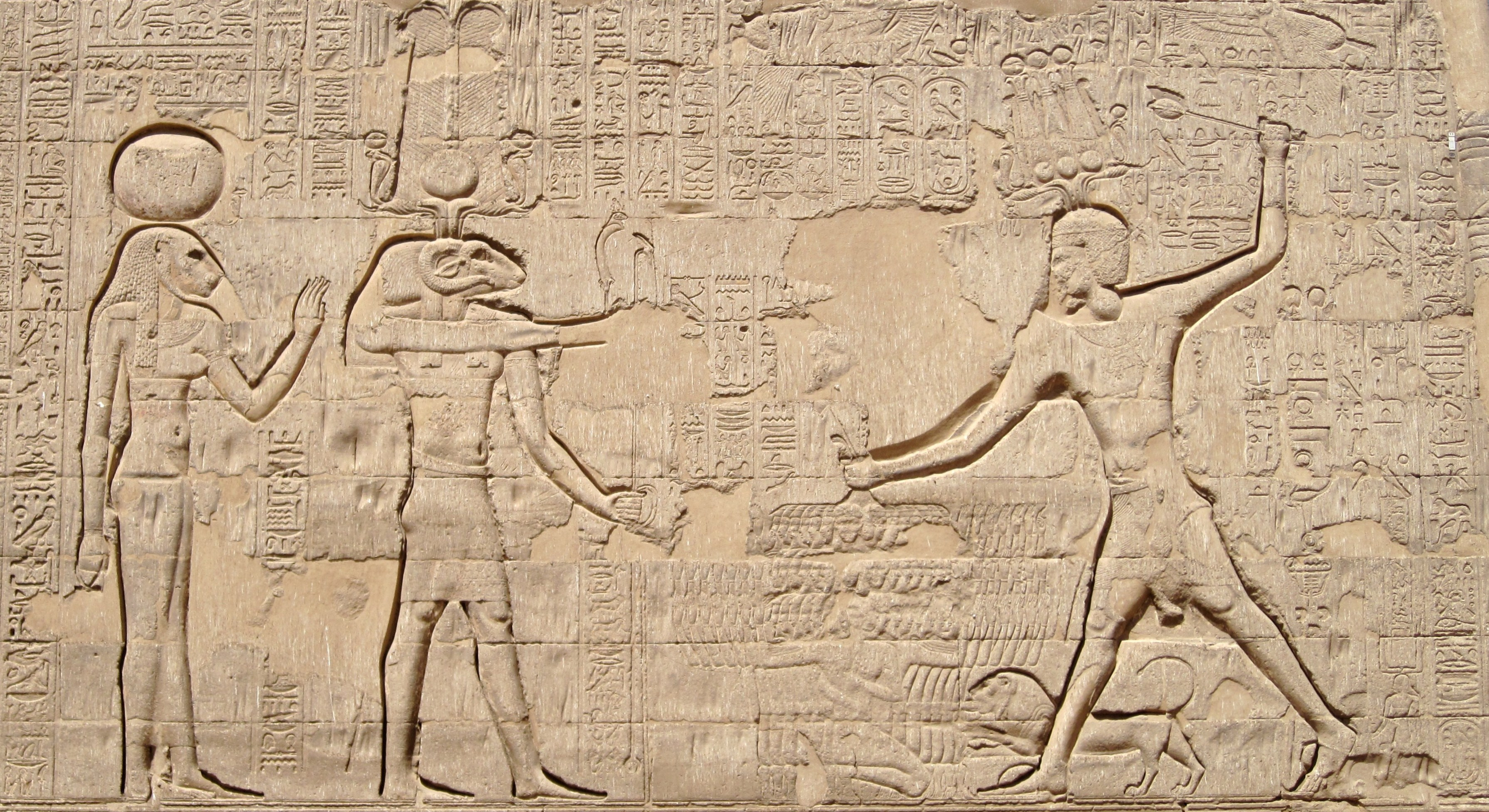 Kaiser Domitian erschlägt vor Chnum und Menhit die Feinde des Landes an der Südostseite des Pronaos des Chnum-Tempels in Esna, Ägypten